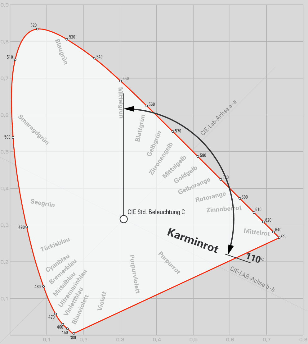 Position von Karminrot im Farbkreis von Müller in CIE-Hufeisen-Grafik eingebaut